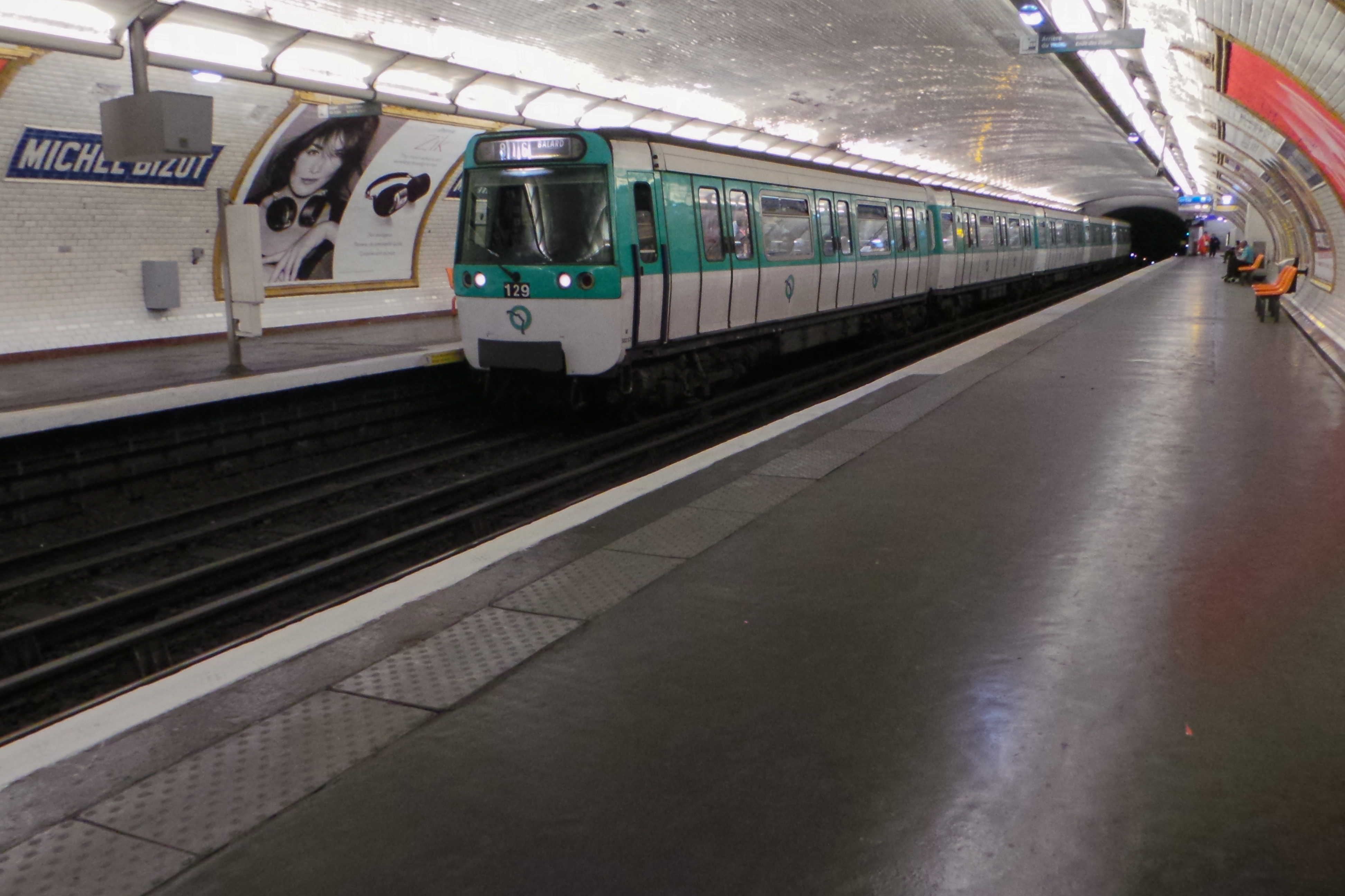 Station de métro Michel Bizot, ligne 8 du métro de Paris - Paris, France